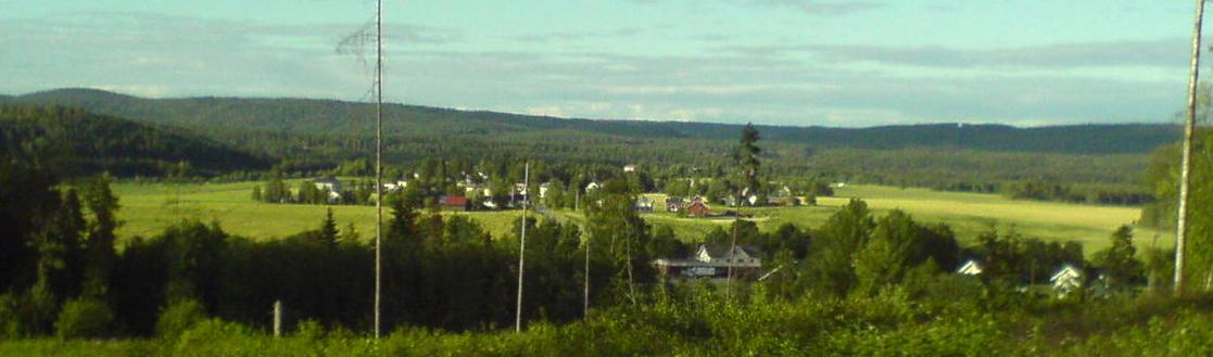 Lierfoss fra stien mot Langvannet